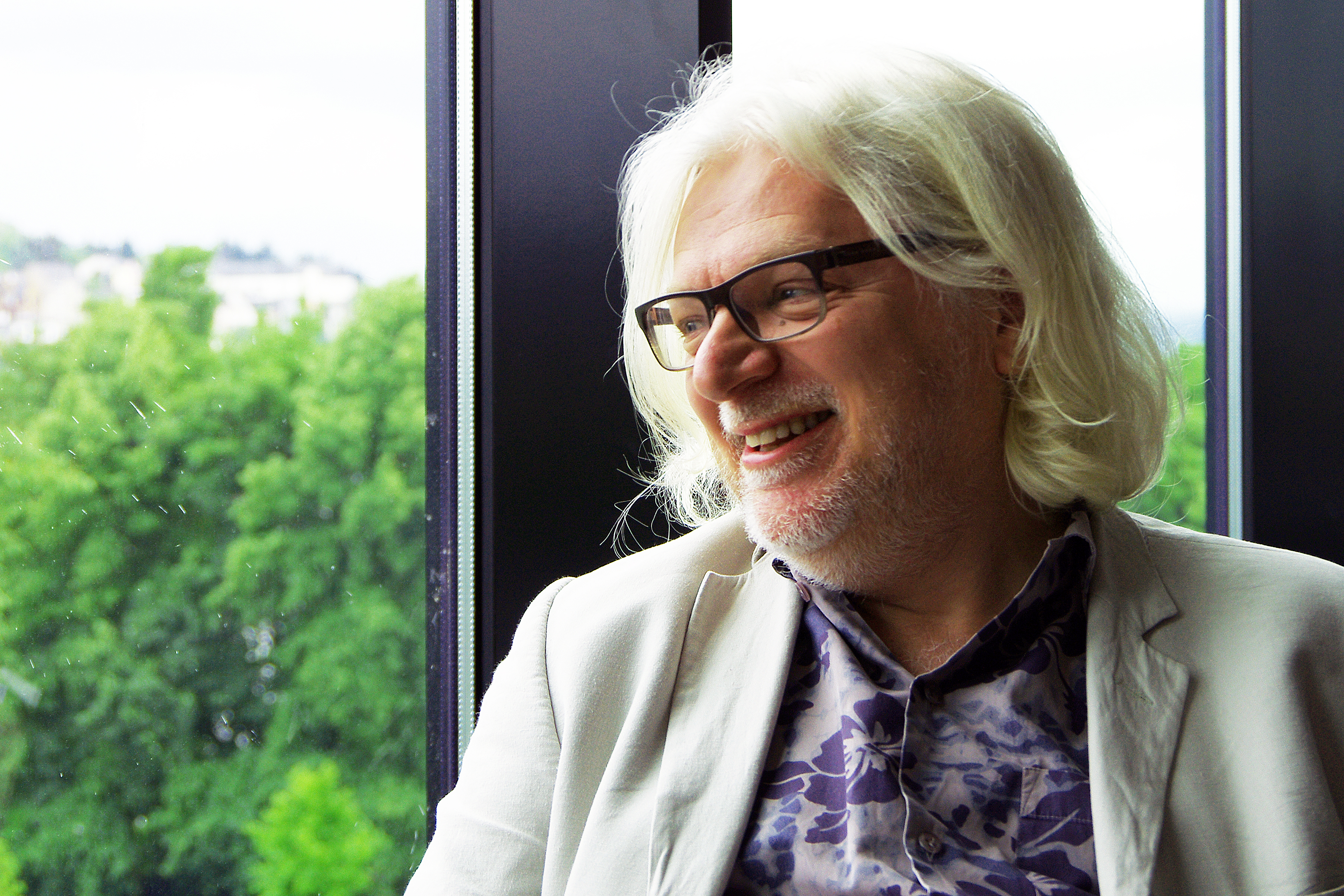 Stephen Goss, Welsh composer and guitarist